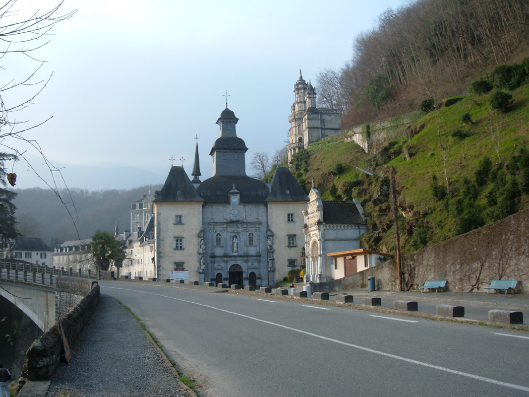 Santuario di Nostra Signora di Bétharram, In Francia, nel comune di Lestelle-Bétharram, nel Dipartimento dei Pirenei Atlantici. Foto personale.